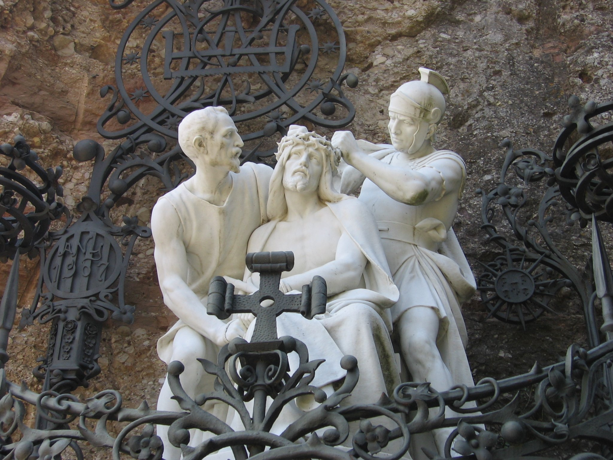 Rosario Monumental de Montserrat: Tercer Misterio de Dolor. La Coronación de Espinas. Obra de Enric Sagnier i Villavecchia y del escultor Anselm Nogués.